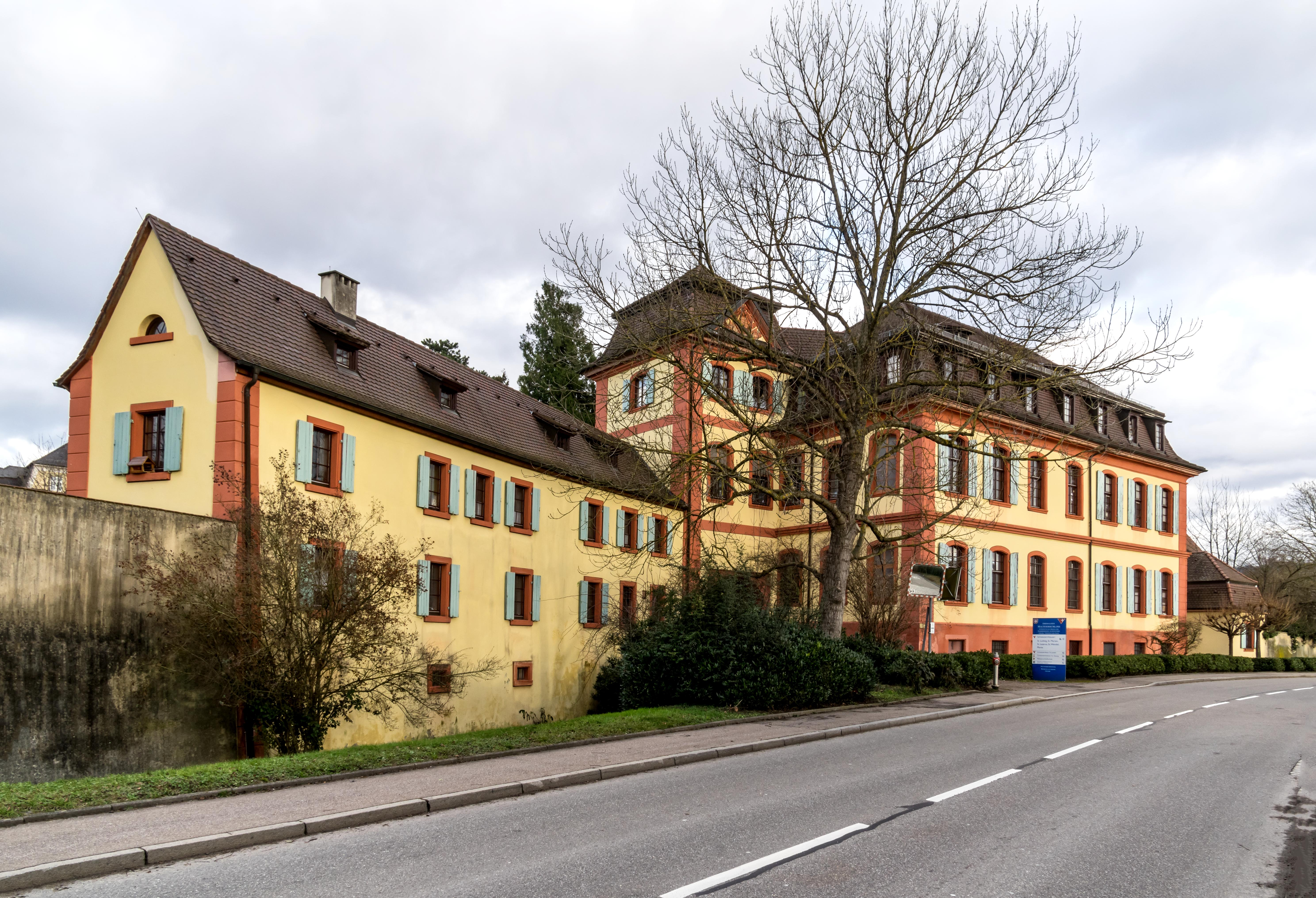 Bilder aus Heitersheim Das ehemalige Malteserschloss Heitersheim, jetzt im Besitz des Ordens der barmherzigen Schwestern vom Hl. Vinzenz von Paul Blick von Außen zum Südeingang und Kanzleigebäude